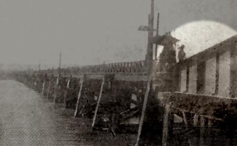 清代臺灣鐵路的淡水河橋，翻攝自1930日治出版品(逾50年)Bân-lâm-gú: Tâi-pak Bo̍k-kiô, huan-liap tsū 1930 Ji̍t tī tshut-pán-phín.(jû 50-nî)